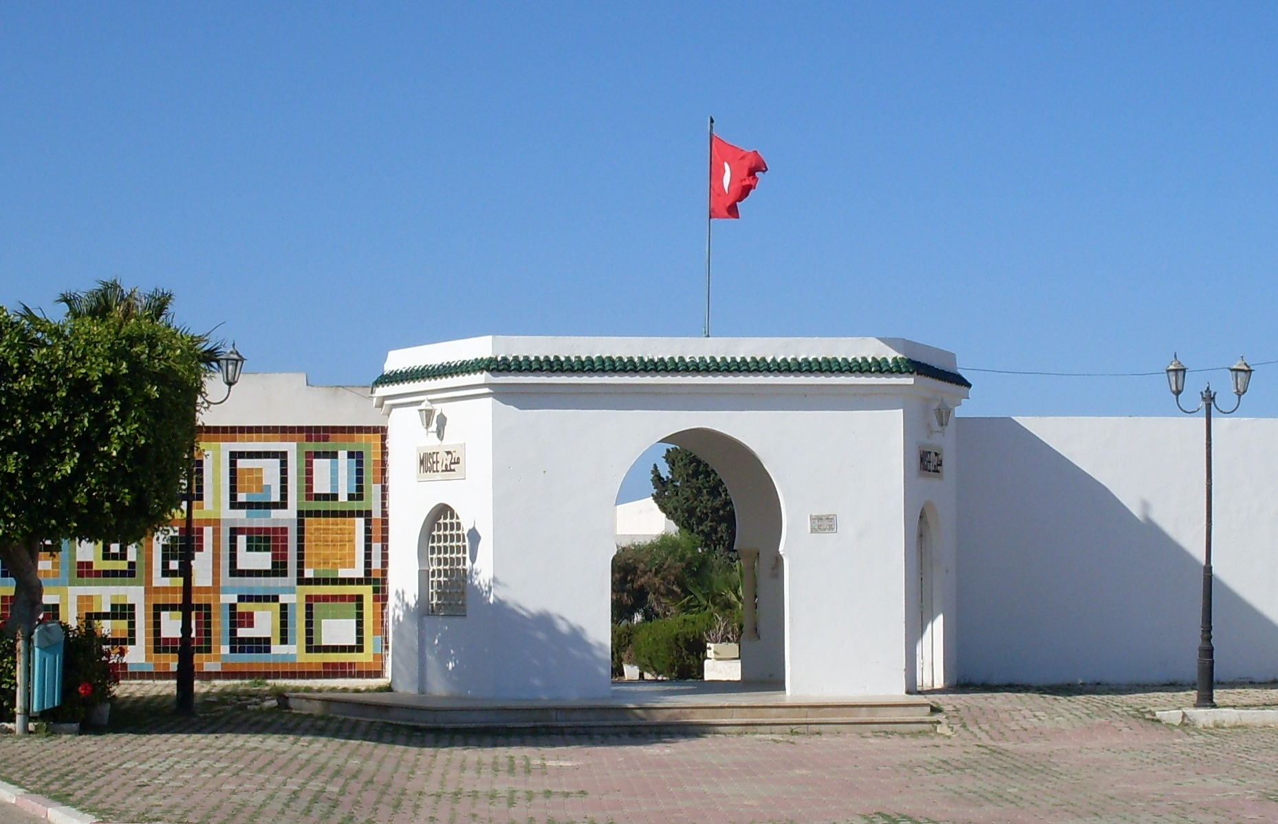 Musée archéologique de Lamata, Tunisie